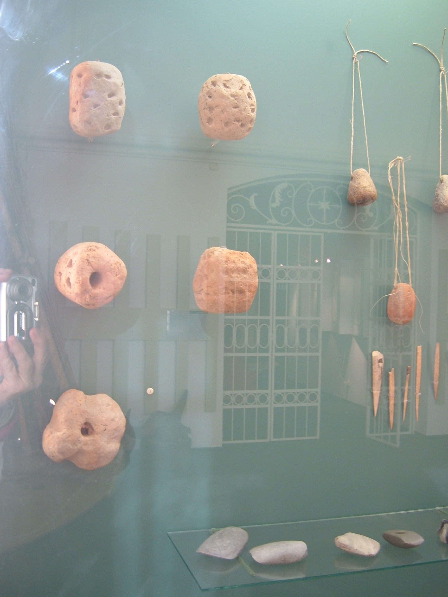 A Damjanich János múzeumból; Szandaszőlős, újkőkori leletek